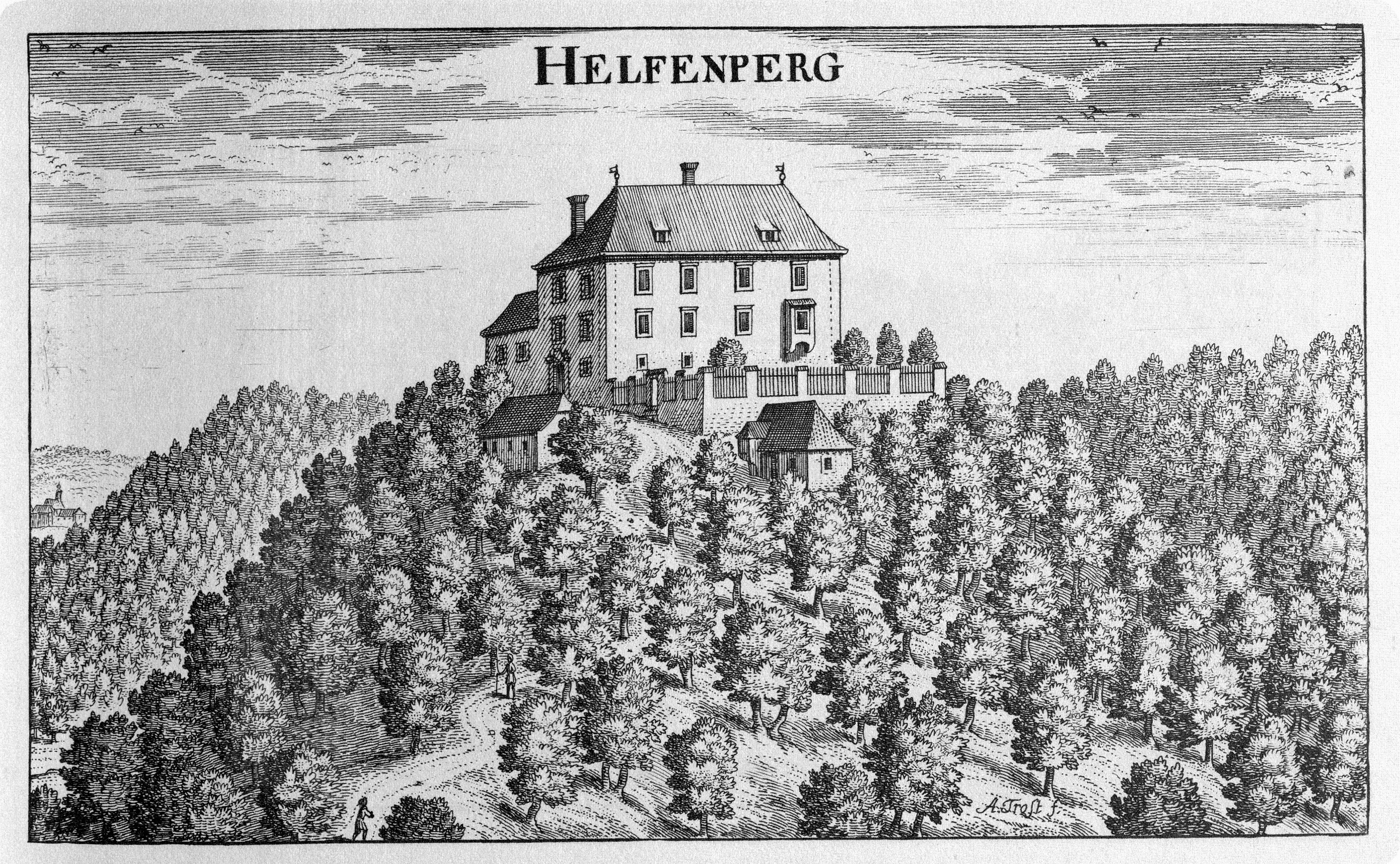 G. M. Vischers Käyserlichen Geographi, Topographia Ducatus Stiriae, Das ist: Eigentliche Delineation / und Abbildung aller Städte / Schlösser / Marcktfleck / Lustgärten / Probsteyen / Stiffter / Clöster und Kirchen / so es sich im Herzogthumb Steyrmarck befinden; Und anjetzo Umb einen billichen Preyß zu finden seynd Bey Johann Bitsch Universitäts Buchhandlern / Auff dem Juden=Platz bey der guldenen Saulen. Graz 1681 Die Nummerierung der Dateien folgt der alphabetischen Reihung der Ortsnamen